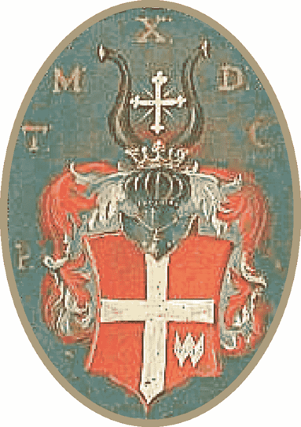 Dębno, herb szlachecki; polisch COA